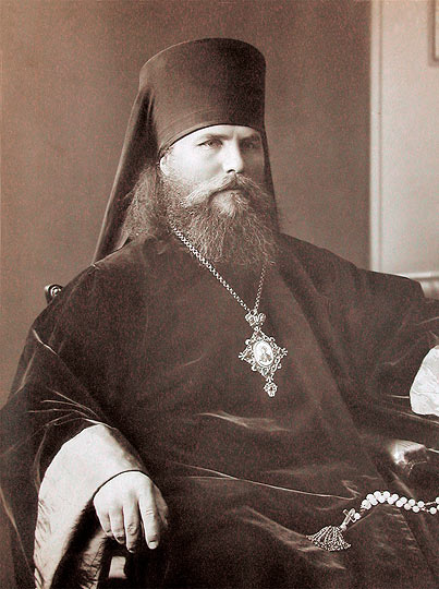 Епископ Геннадий (Туберозов)